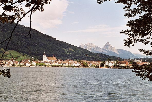 Arth am Zugersee